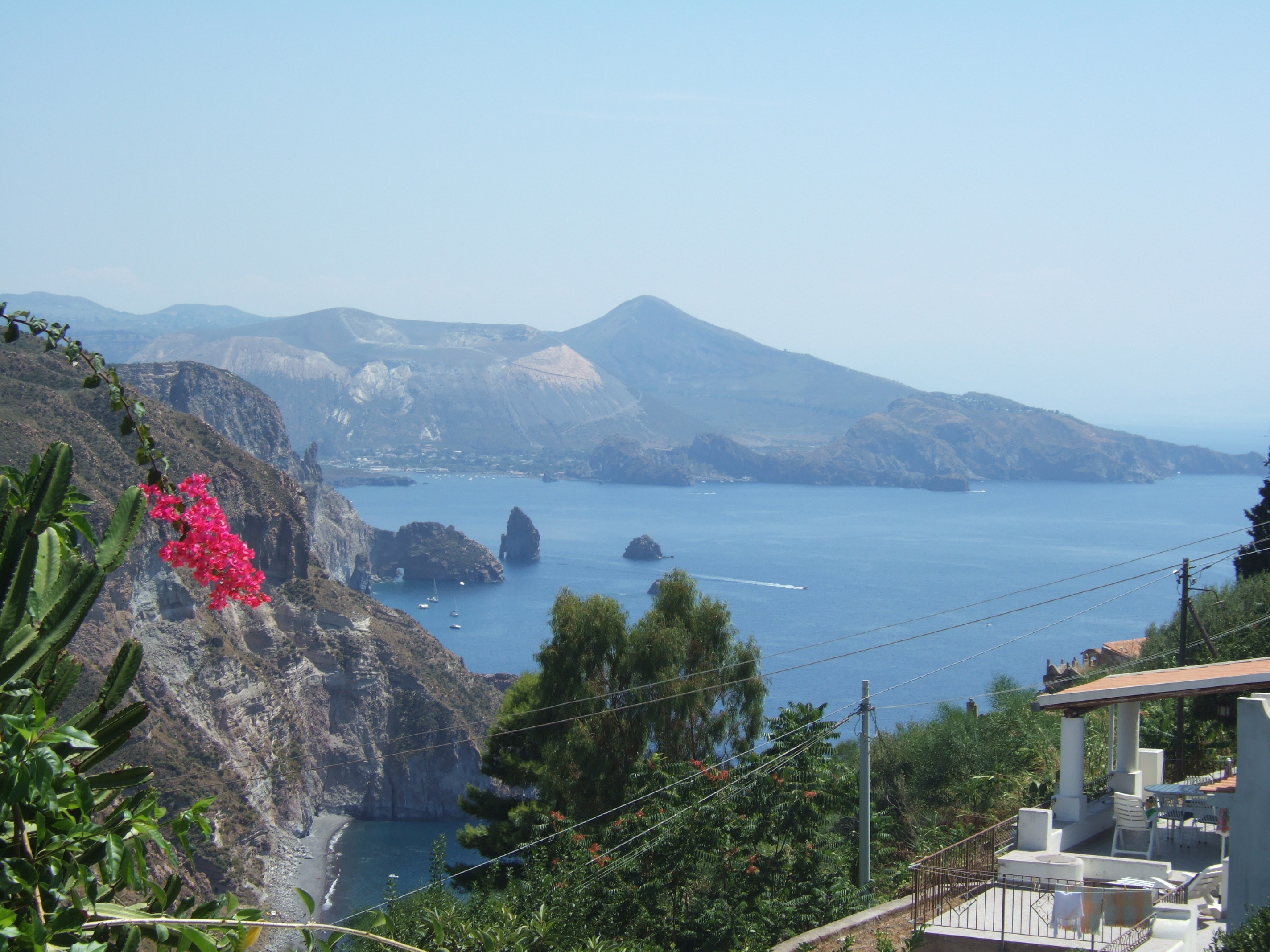 Panorama di Lipari da località Quattrocchi. Sullo sfondo l'isola di Vulcano. A view of Lipari from Quattrocchi. In the background, Vulcano.